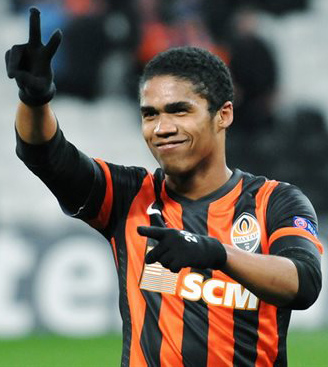 Дуглас Коста празднует мяч в ворота ФК Реал Сосьедат.